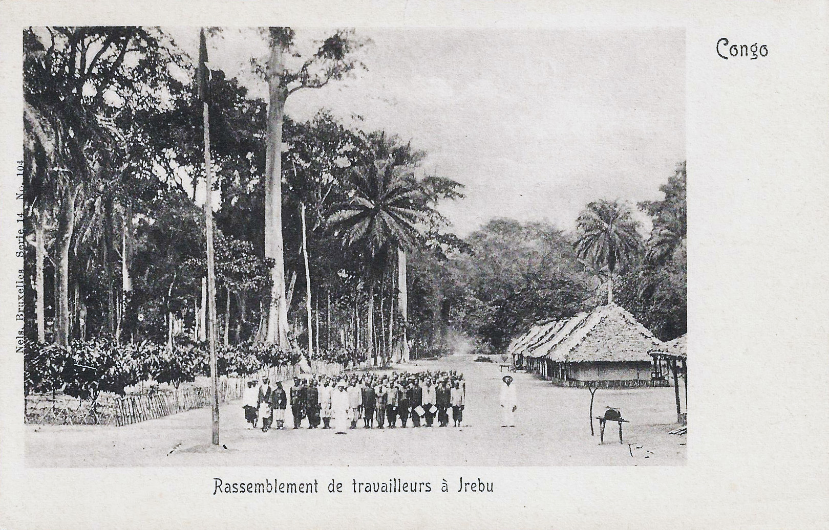 Rassemblement de travaileurs à Irebu. Congo. Nels, Bruxelles, série 14, n° 104